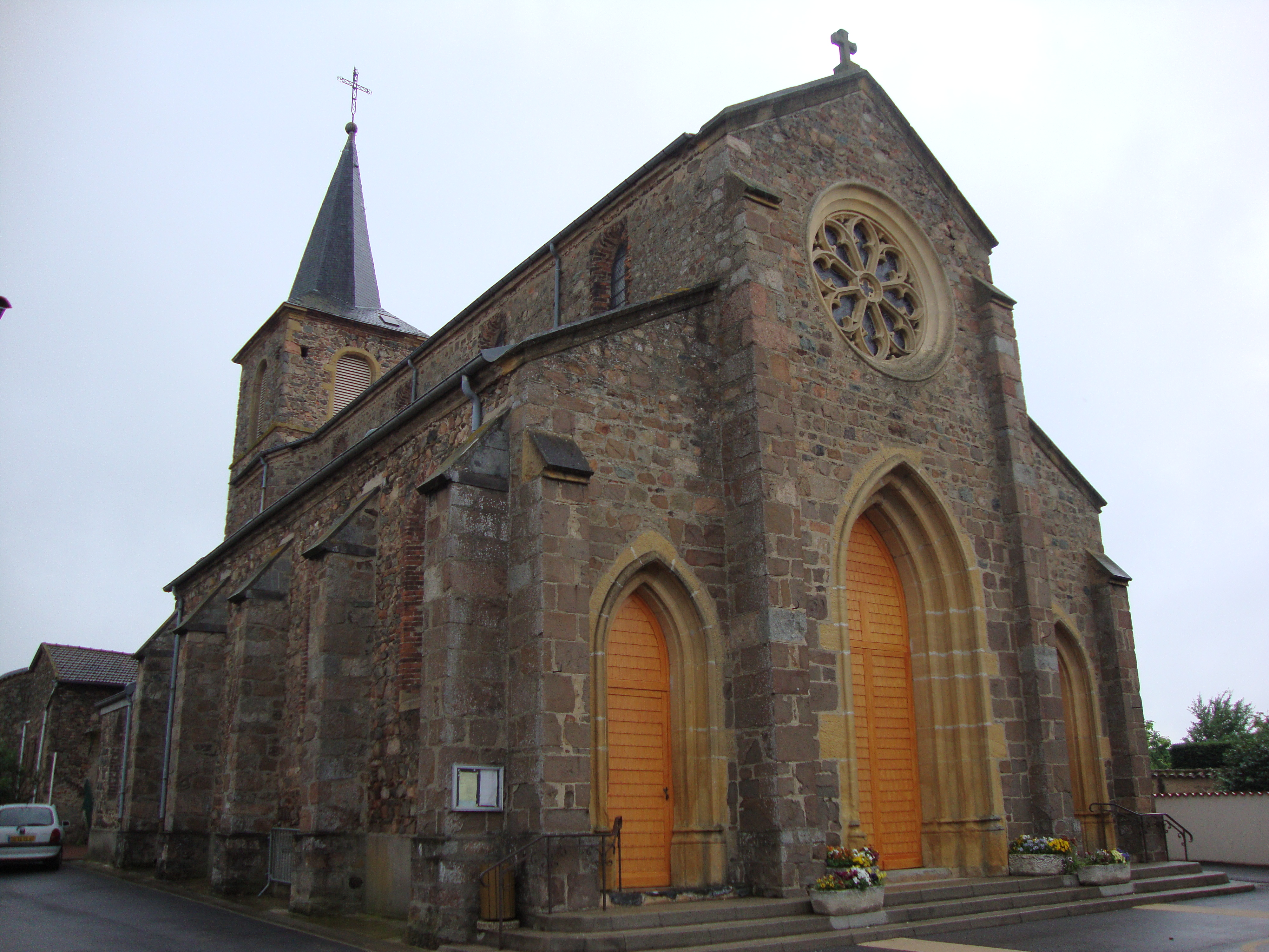 Pinay (Loire, Fr) église coté façade